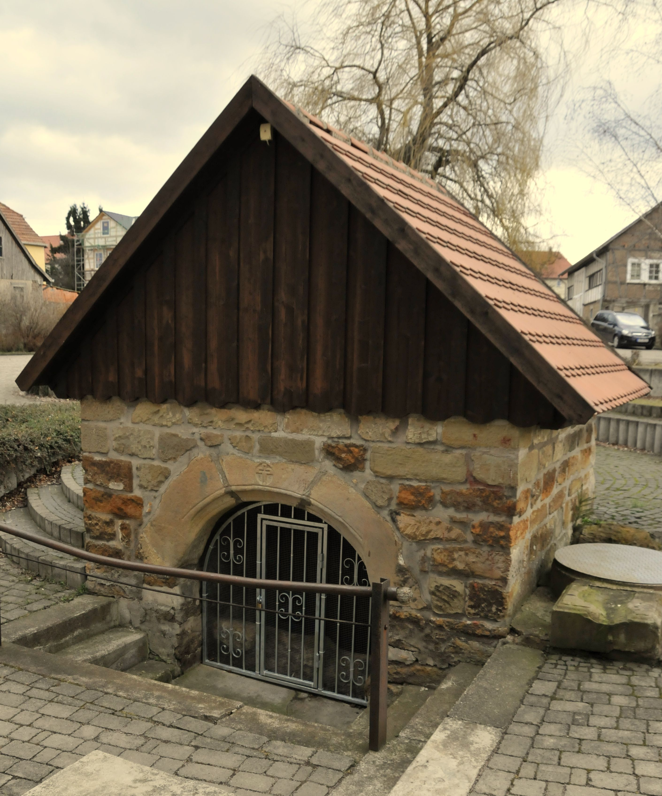 Kornhochheim, Davids Born